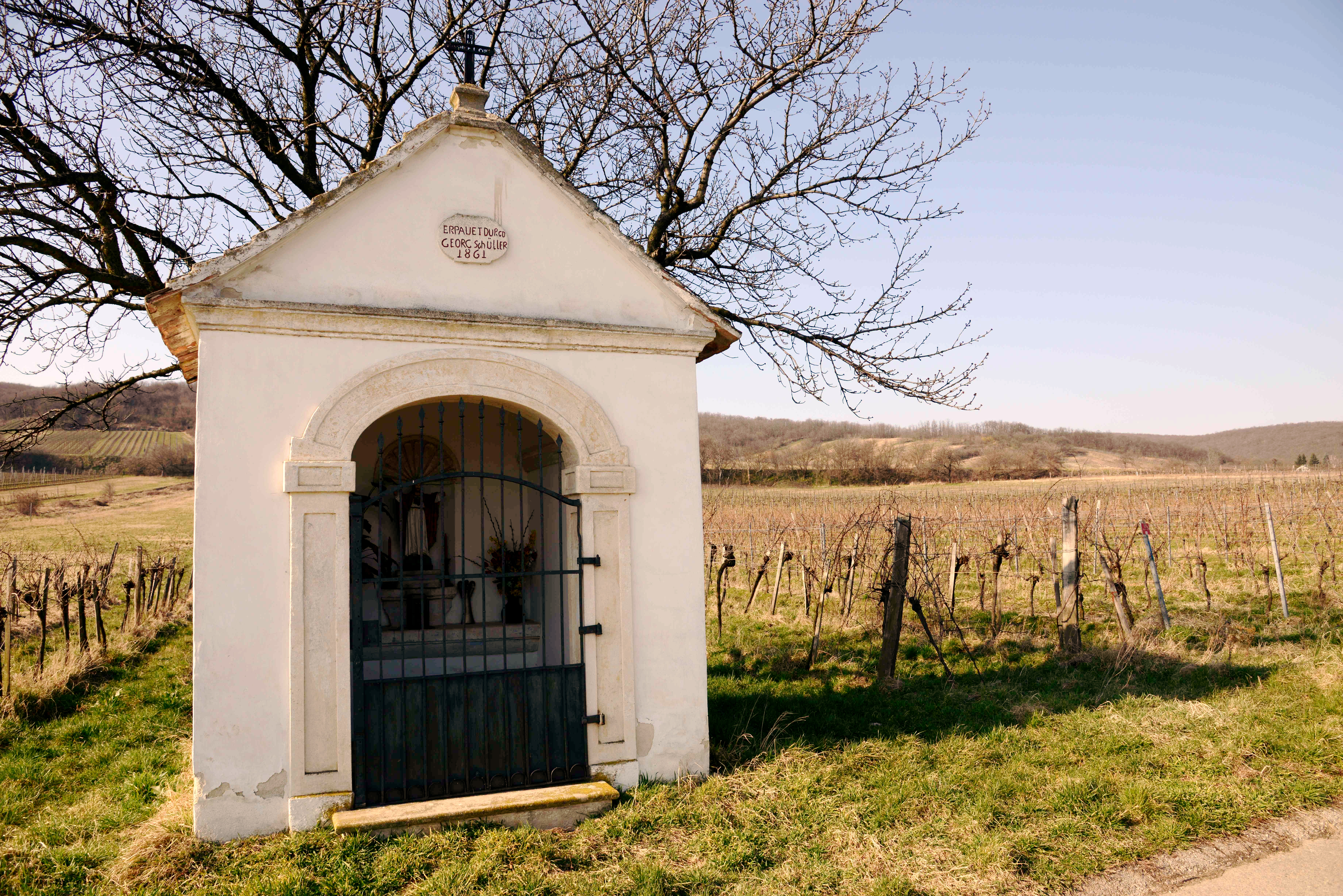 Weingartenkapelle in der Ried Streifling, Purbach